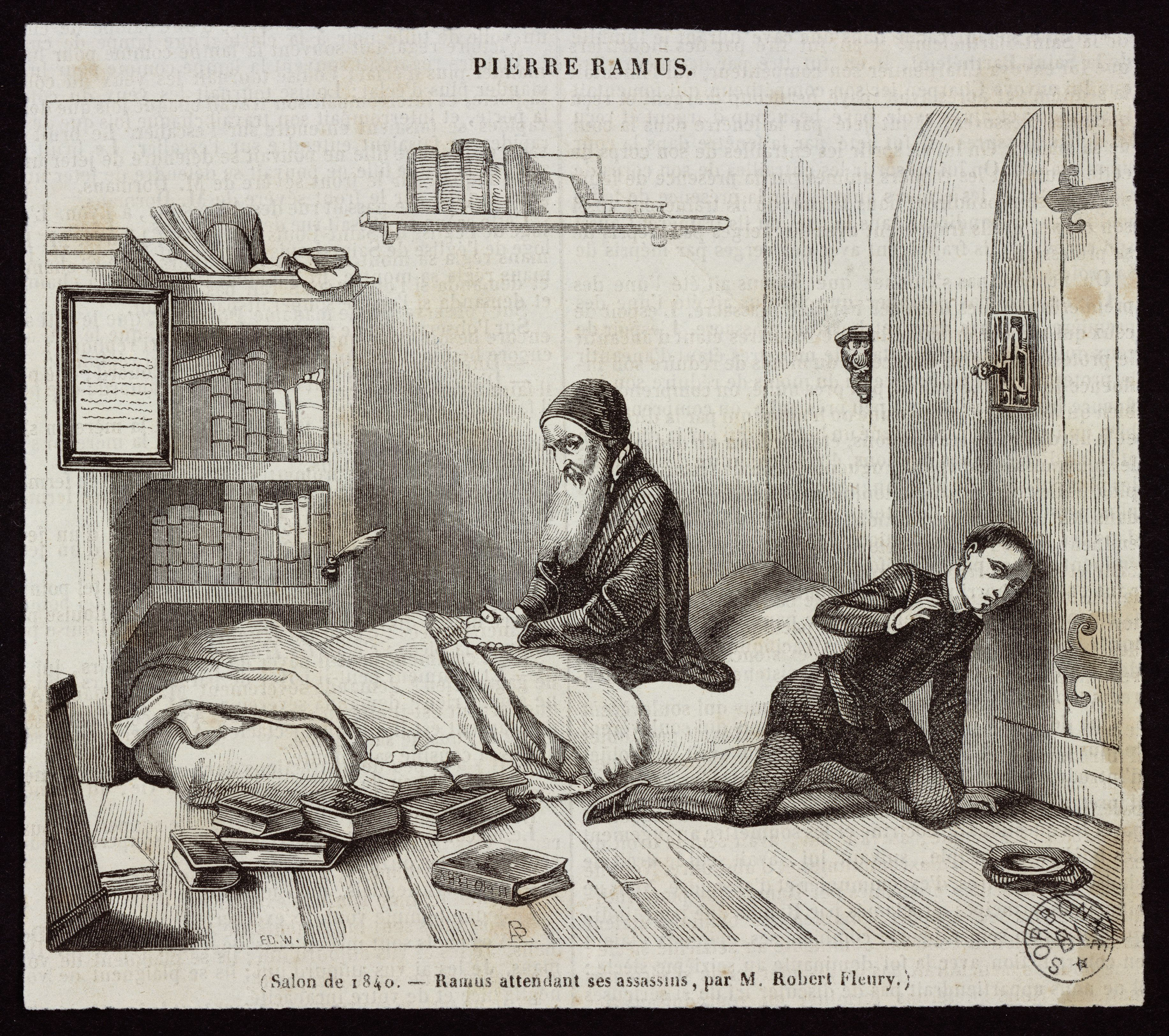 Estampe